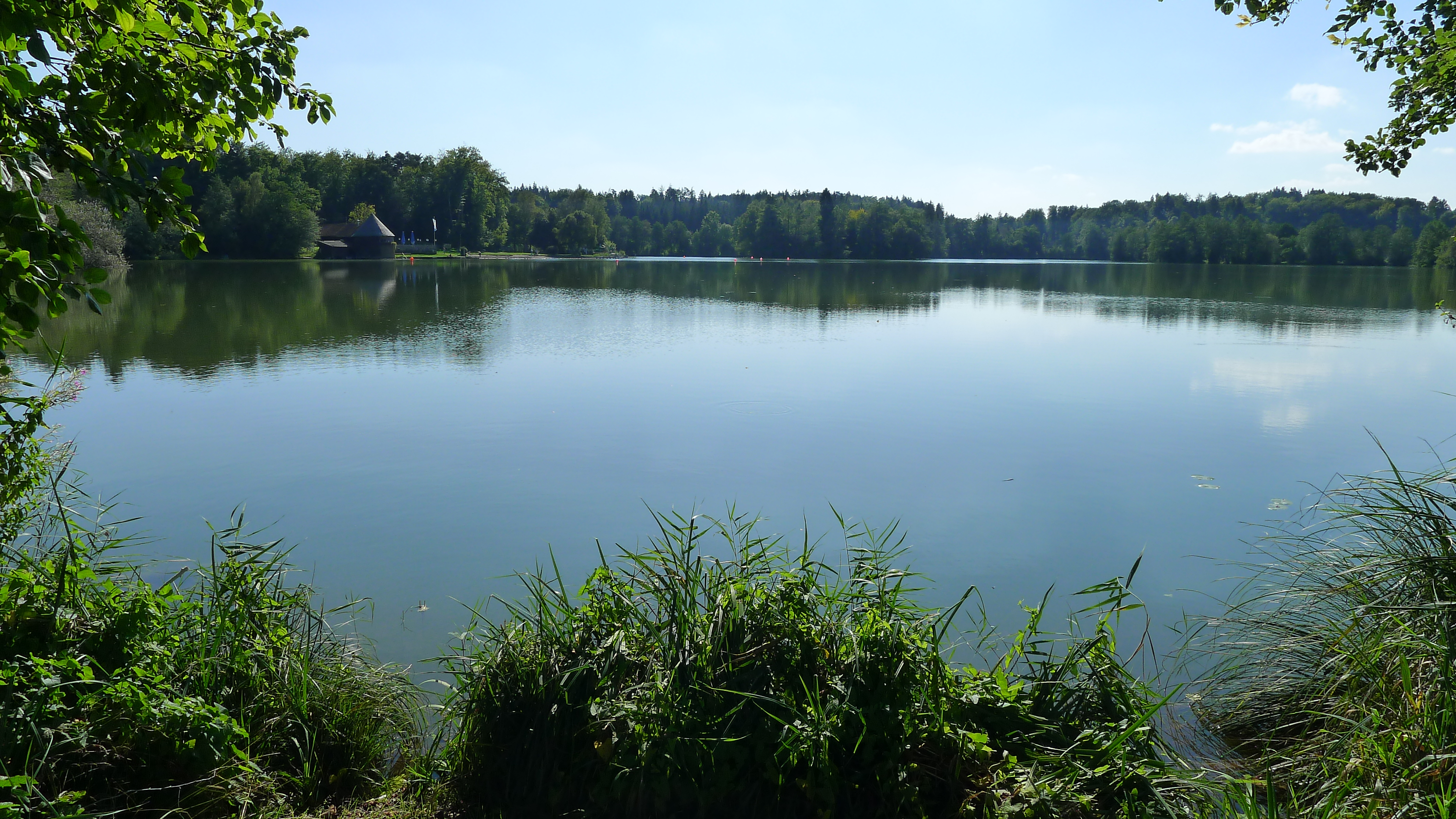 Leitgeringer See; Blickrichtung nach Südwest